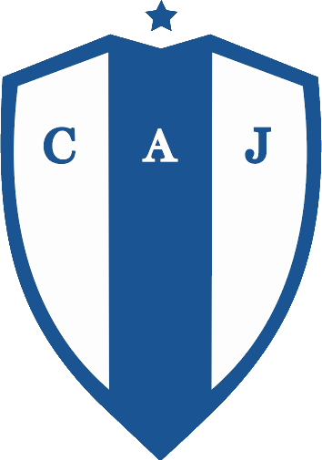 Escudo Oficial Club Atlético Juventud Uruguay